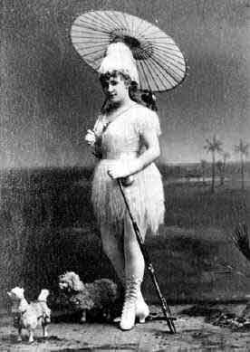 Lydia Thompson in "Robinson Cruso"